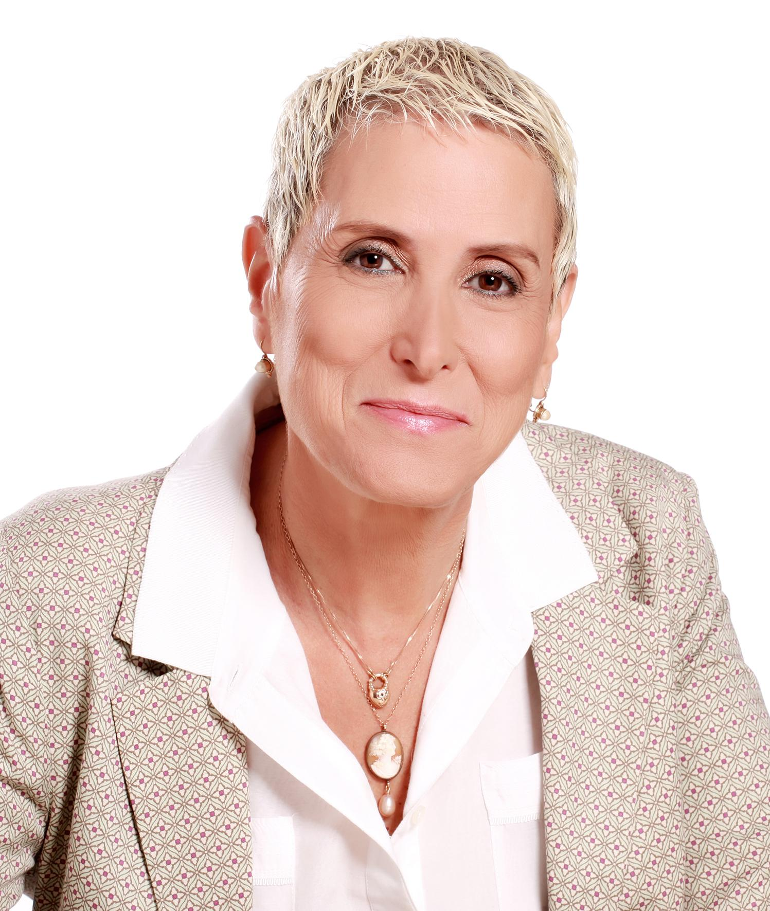 מירה אלטמן